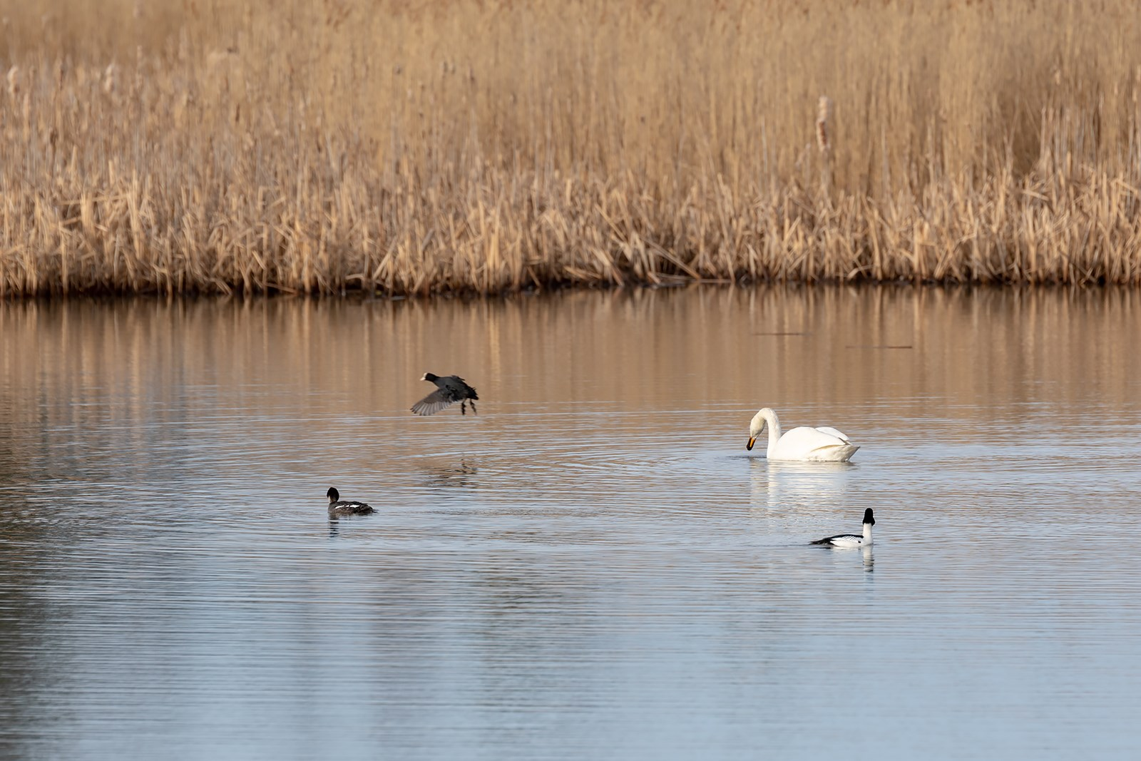 Laupuksensalmen luonnonsuojelualueen linnustoa: telkkä, nokikana, laulujoutsen.